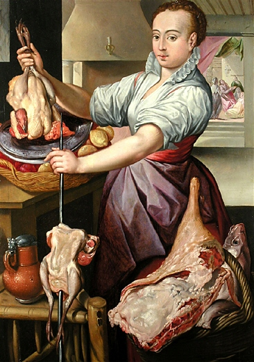 Die Köchin mit Geflügel